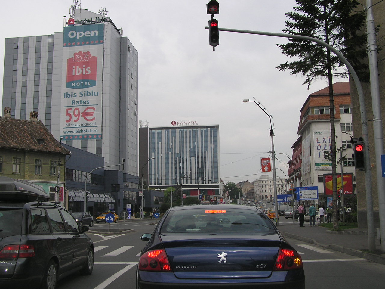 Zentrum von Sibiu (Hermannstadt), Siebenbürgen, RumänienRomână: Centrul din Sibiu (Hermannstadt), Transilvania, România